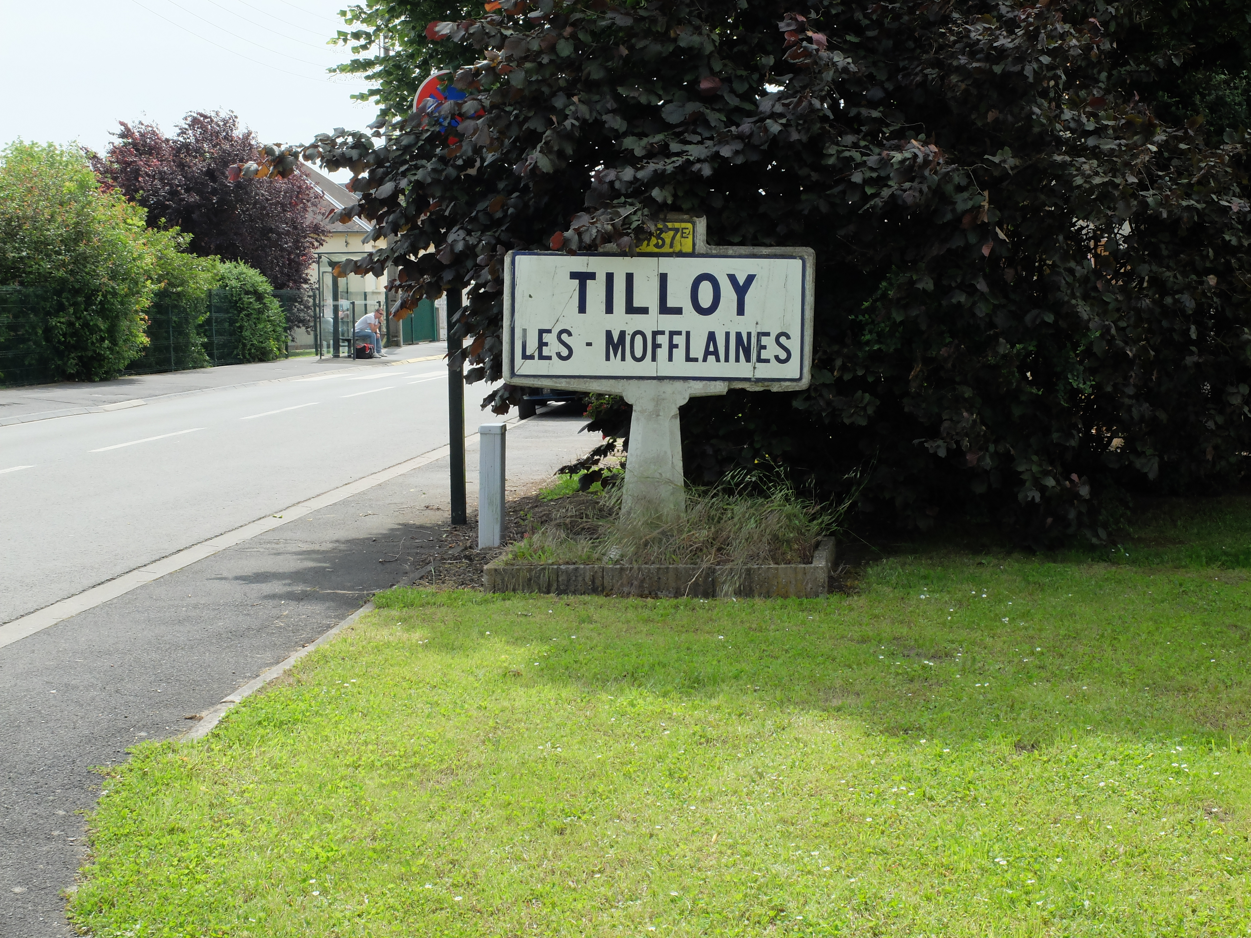 Vue d'une entrée de la commune de Tilloy-lès-Mofflaines.